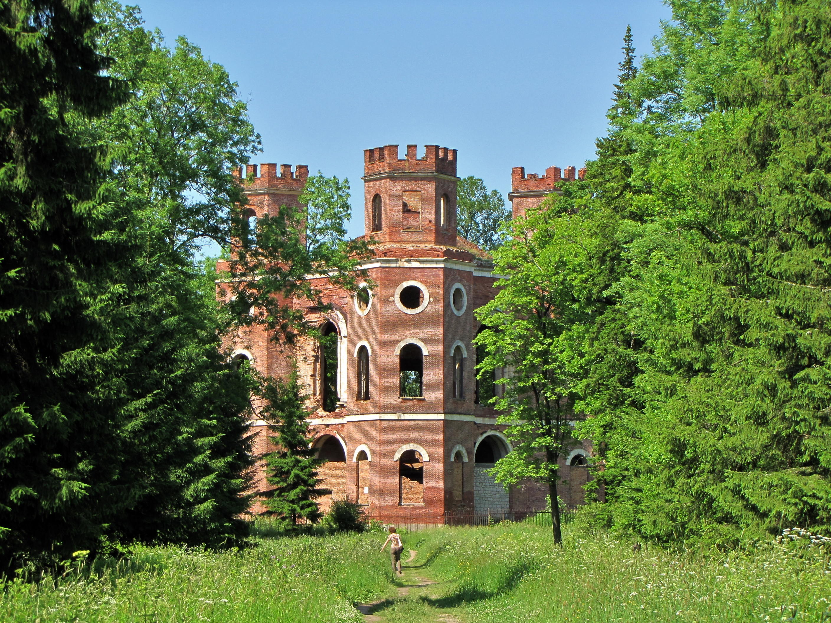 Павильон «Арсенал» («Монбижу») (Санкт-Петербург и Лен.область, Пушкин, пейзажная часть парка)